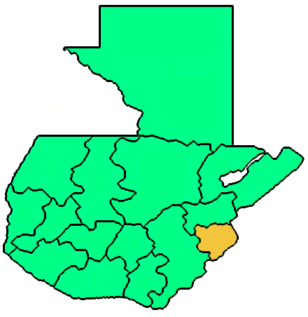 Mappa della prelatura cattolica di Esquipulas, in Guatemala. Lavoro personale eseguito a partire da questa immagine di Commons. Fonte per i confini delle diocesi